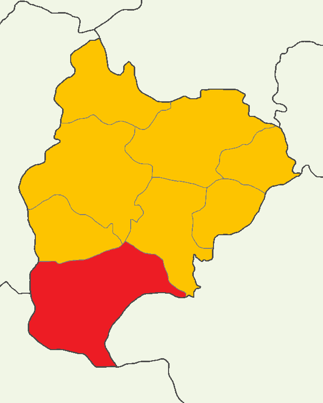 Bilecik'te 2014 Türkiye cumhurbaşkanlığı seçimi sonuçları